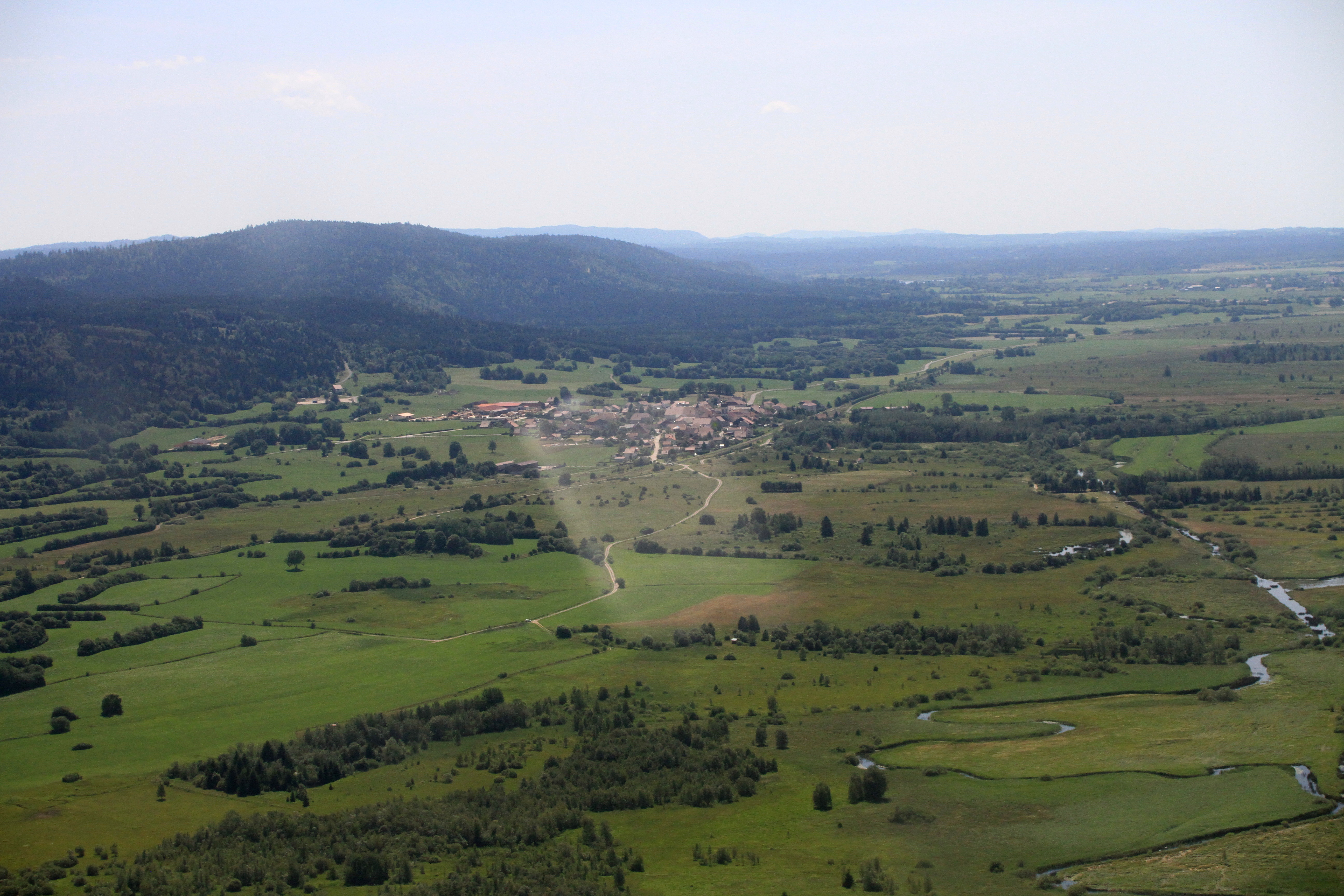 Sainte-Colombre (Doubs) vue aérienne